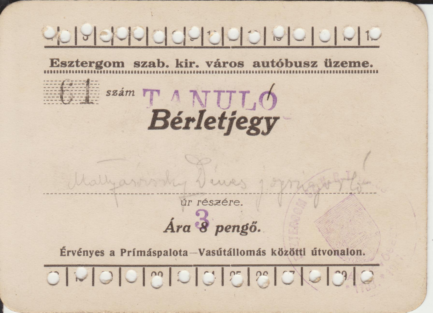 Esztergomi tanuló buszbérlet 1930-as évek végéről